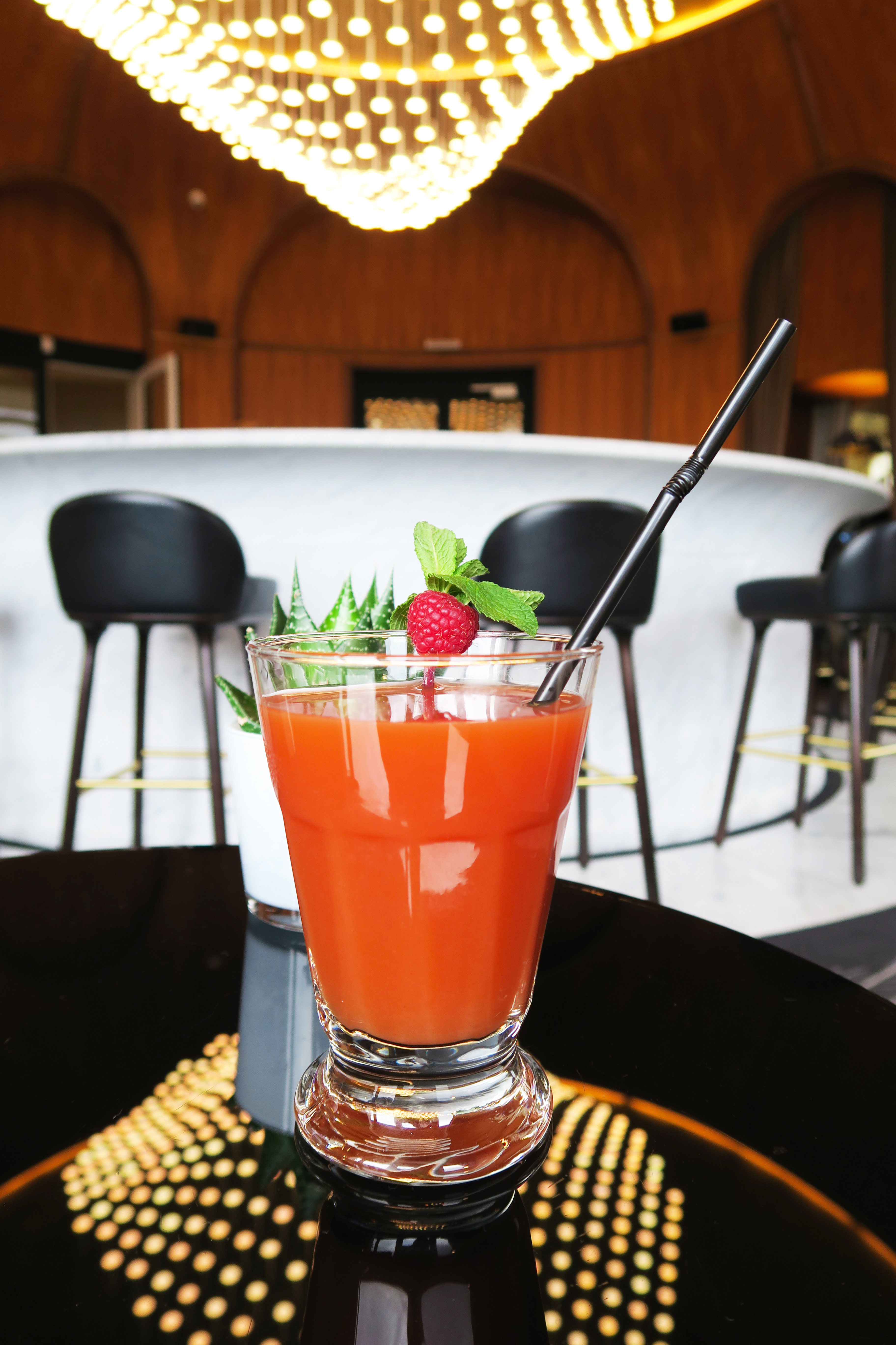 Cocktail Bonne Mine